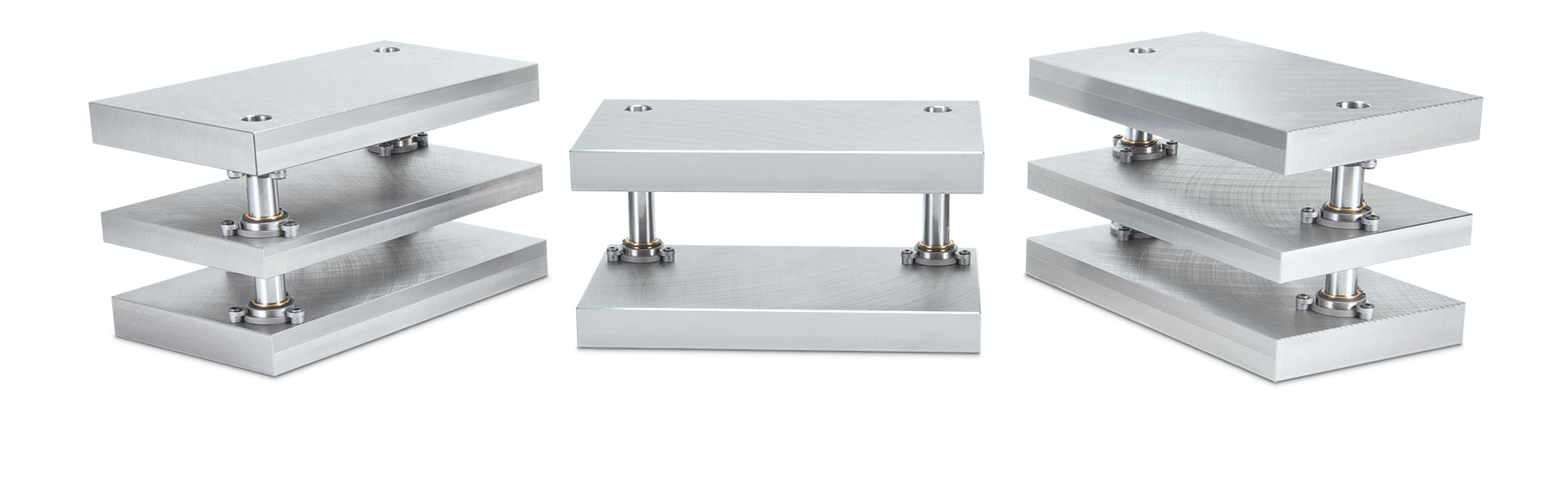 Meusburger Zweisäulengestell (v.l.n.r. Diagonal, Hinten, Zentral)